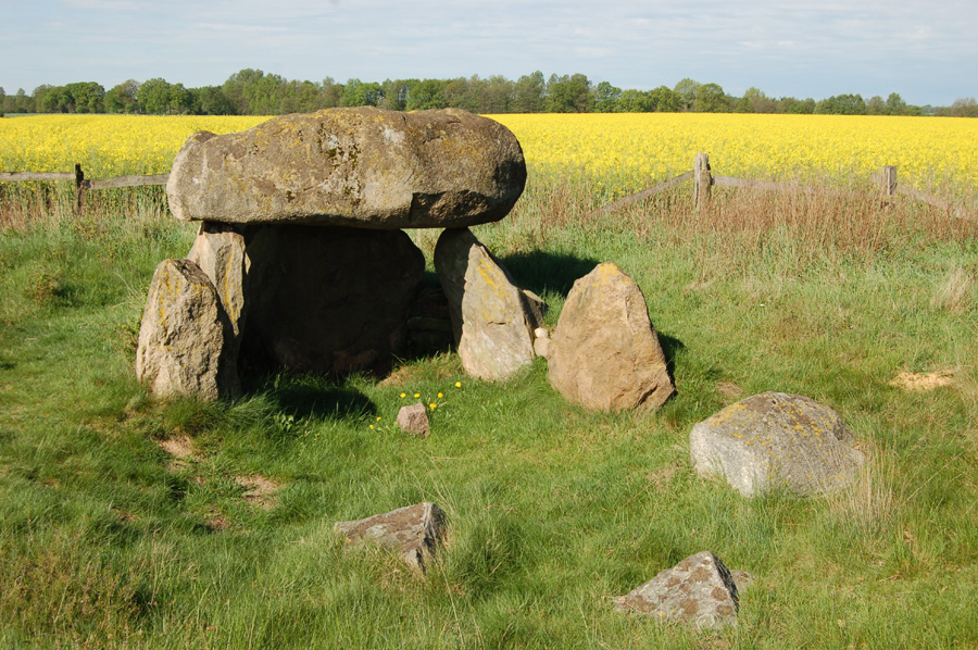 restauriertes Großsteingrab in der Steinalkenheide